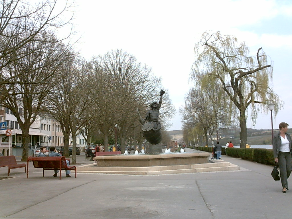 Uferpromenade von Remich mit sich drehender Brunnenfigur, selbst fotografiert, April 2006, --Xocolatl 03:24, 22 April 2006 (UTC)